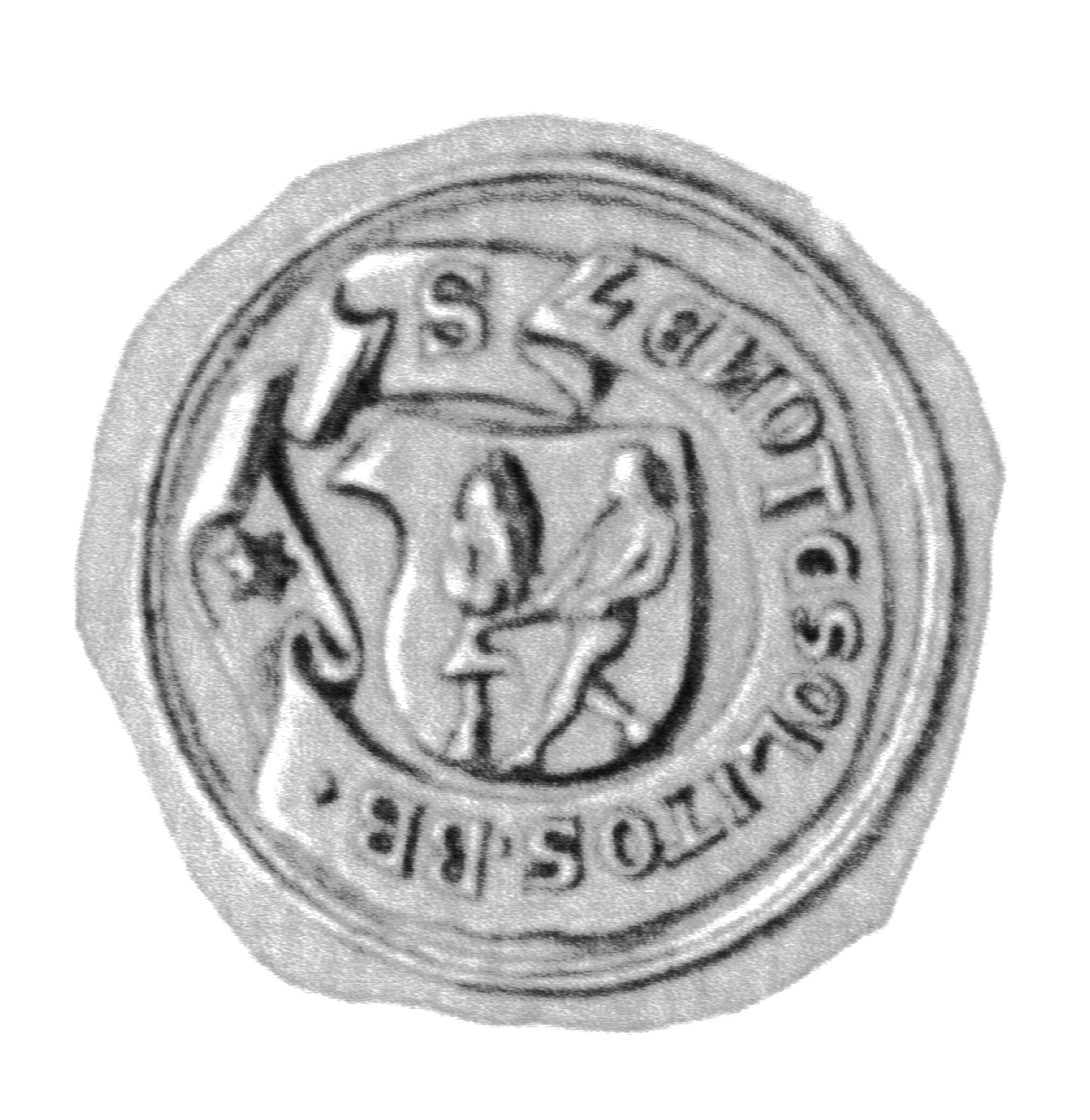 Siegel des Ratsmannes Bernd Bomhouwer. Das Siegel stammt aus der Zeit um 1511. Siehe Emil Ferdinand Fehling: Lübeckische Ratslinie, Nr. 590 (Berend Bomhover).